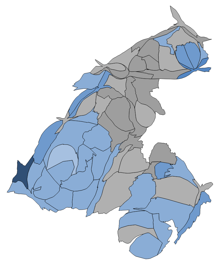 顏色對照表